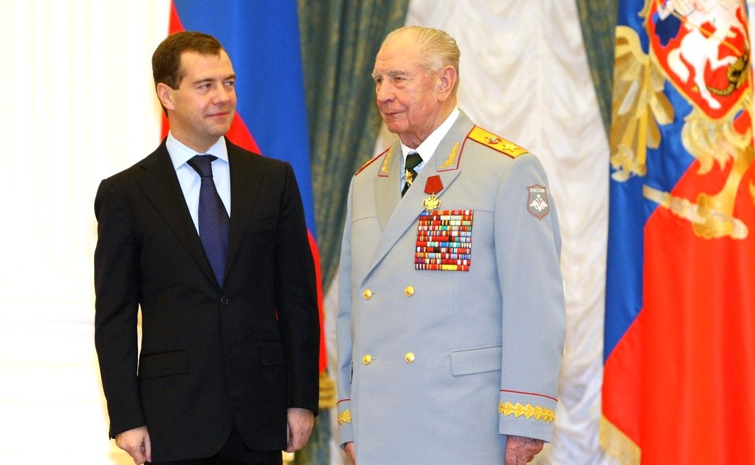 Маршал Советского Союза Дмитрий Тимофеевич Язов